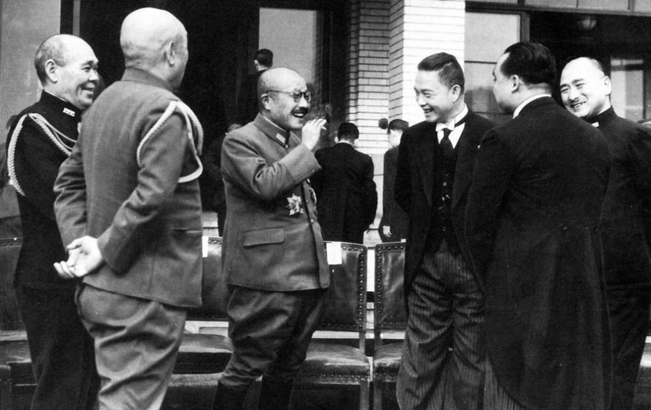 1938年，汪精卫以国民党中央副总裁身份另立国民政府，声称以“曲线救国”为纲领。图为1942年12月，汪精卫（右三）前往东京参加“大东亚战争一周年纪念会”时会见日本首相东条英机（左三）。